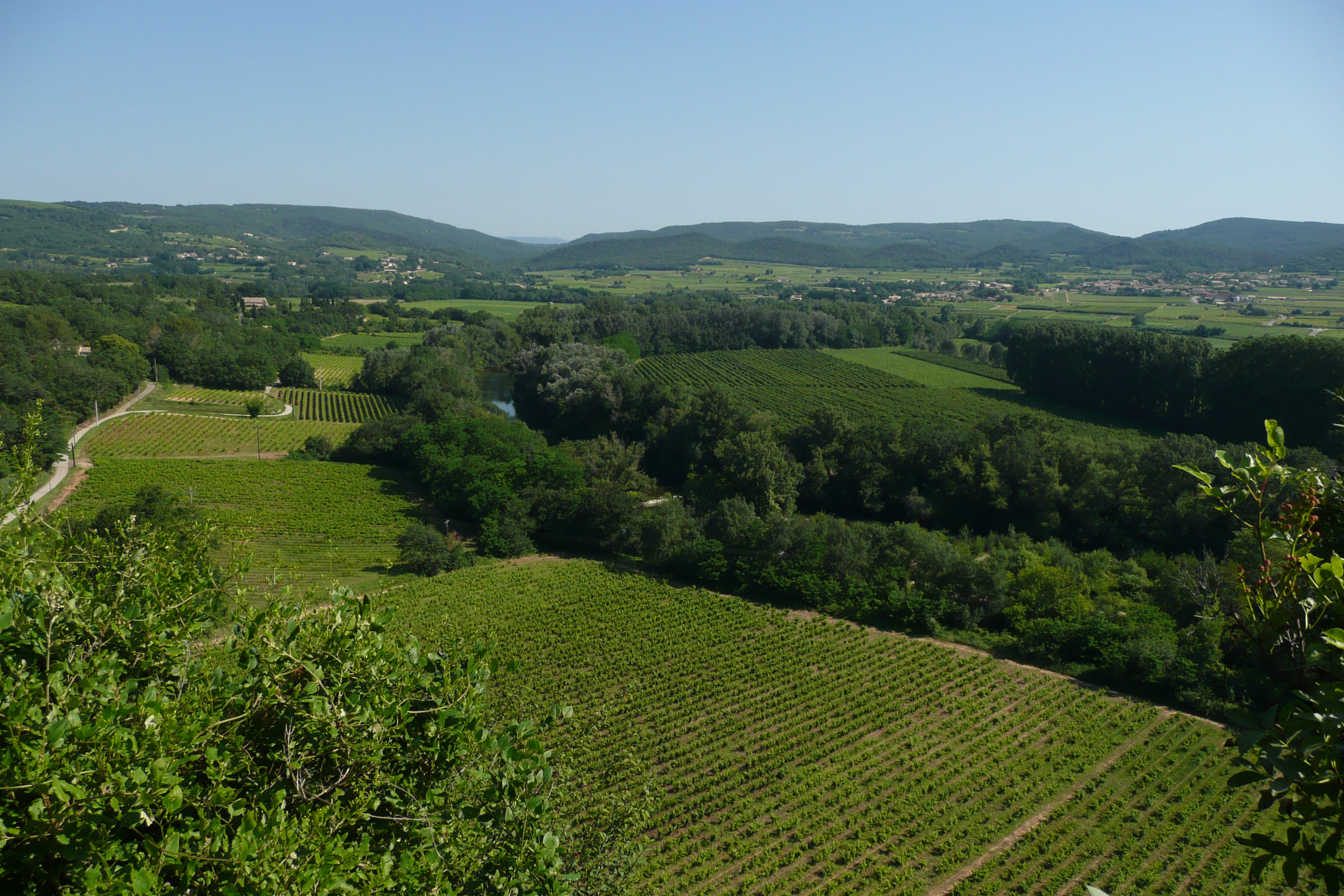 Paysage depuis La Roque-sur-Cèze.